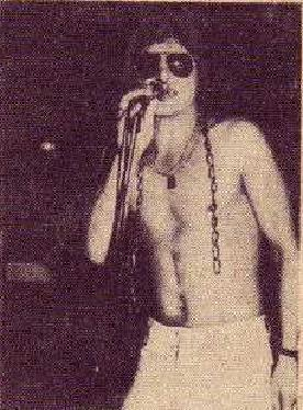 Grzegorz Markowski, 1983r.